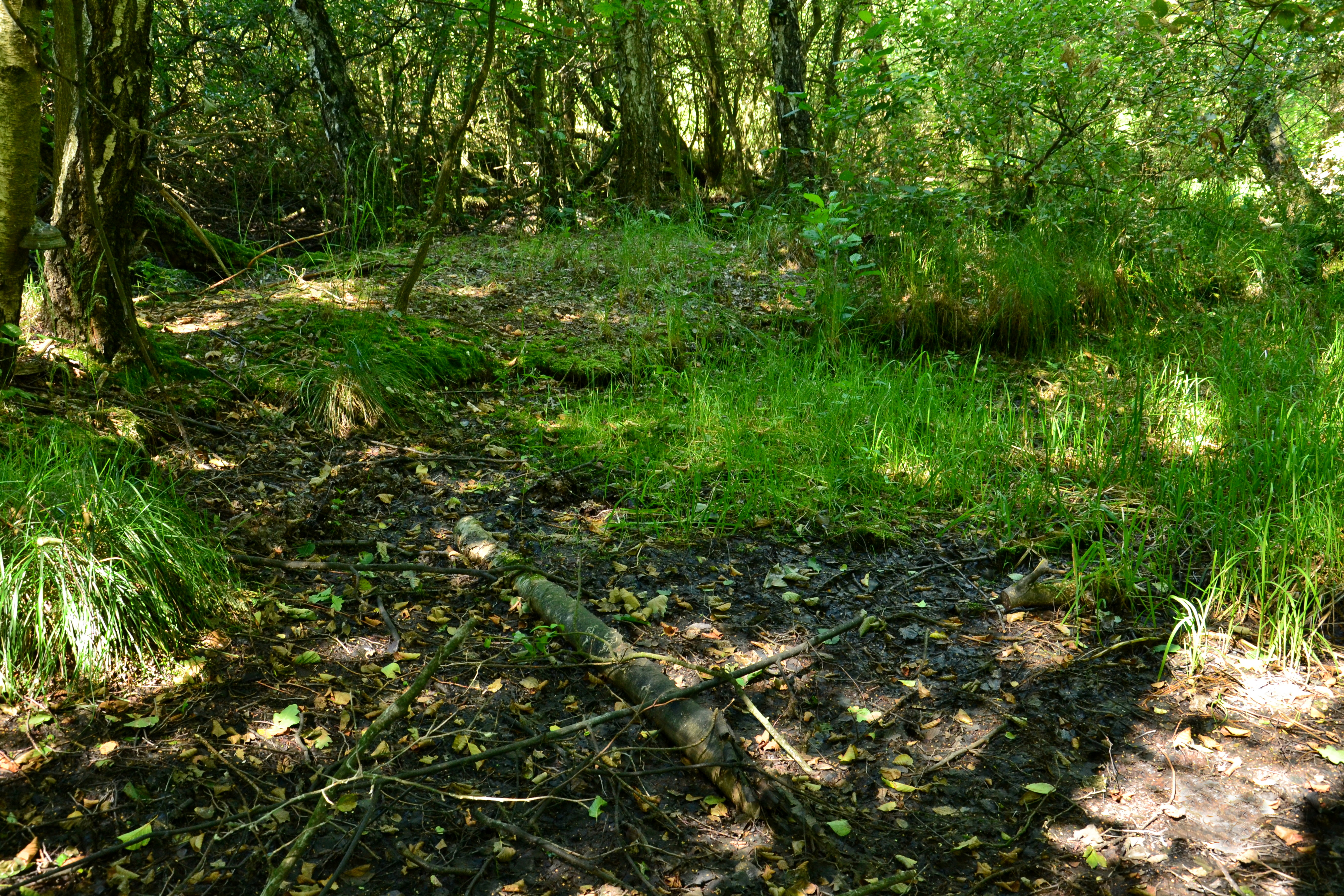 Vyschlá tůň u východního okraje chráněného území